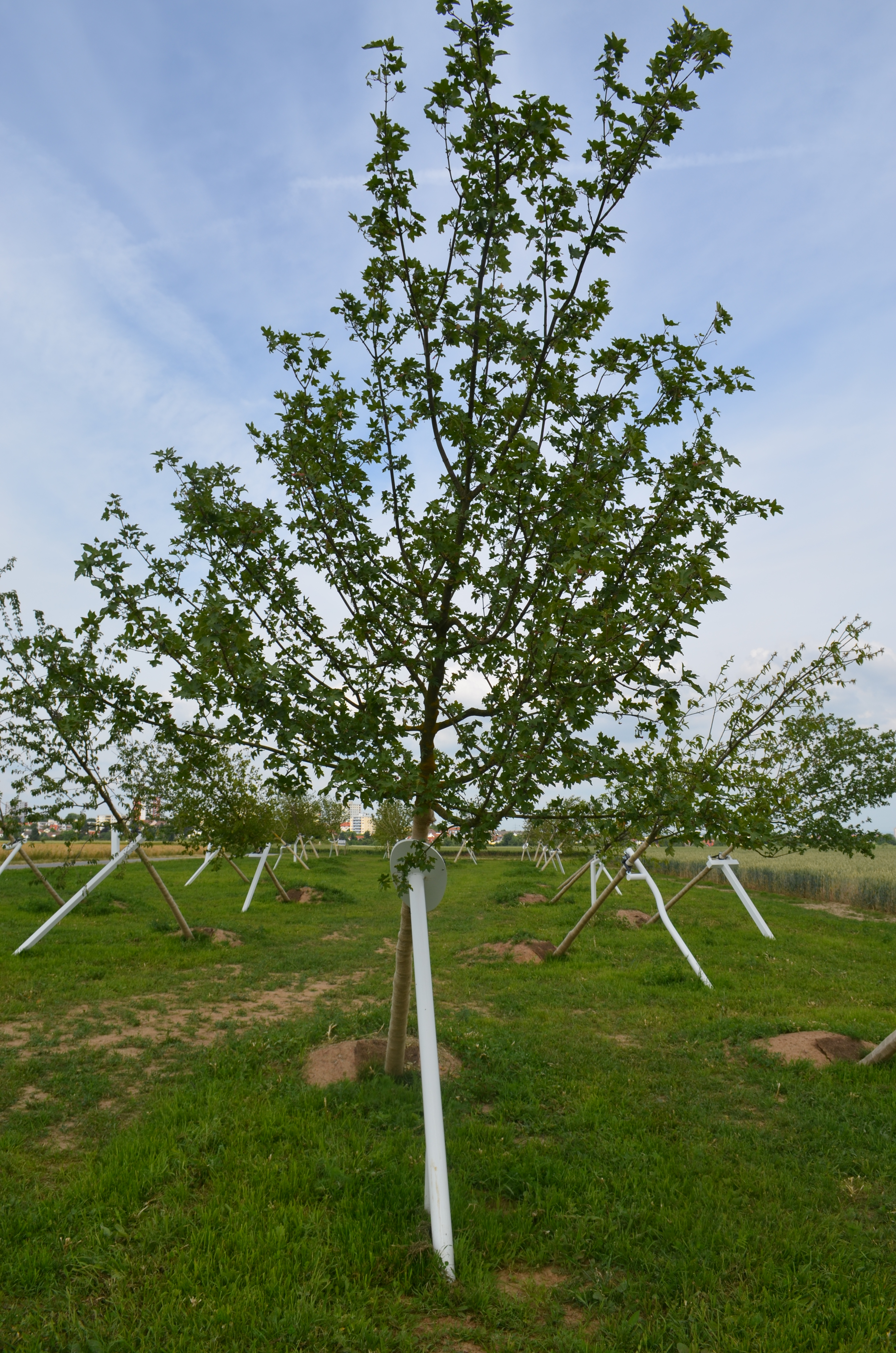 "Schiefer Wald" zwischen Steinbach und Eschborn. Das Kunstwerk von Ulrich Genth und Heike Mutter soll an die Schlacht bei Eschborn erinnern.